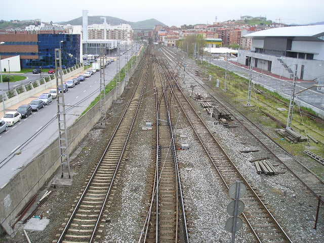 Renferen trenbidea Barakaldo parean.